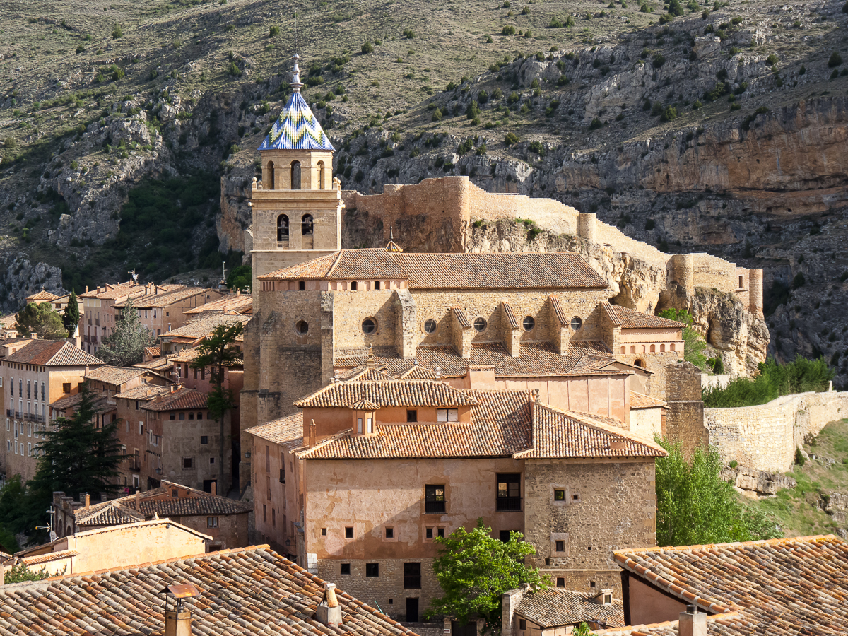 09062012 185305 ALB 2048